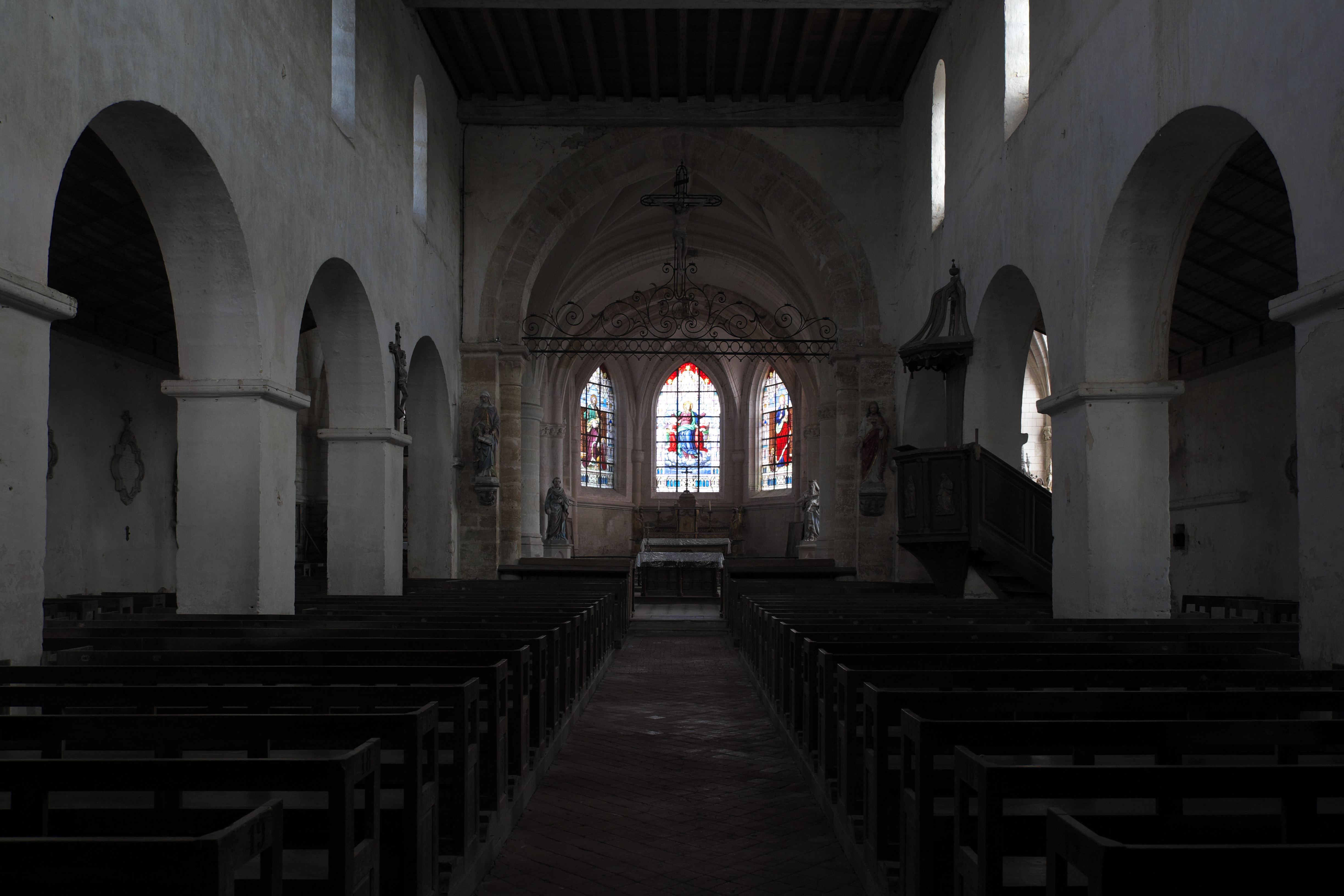 Katholische Kirche Notre-Dame-de-l'Assomption in Droyes im Département Haute-Marne (Champagne-Ardenne/Frankreich), Innenraum